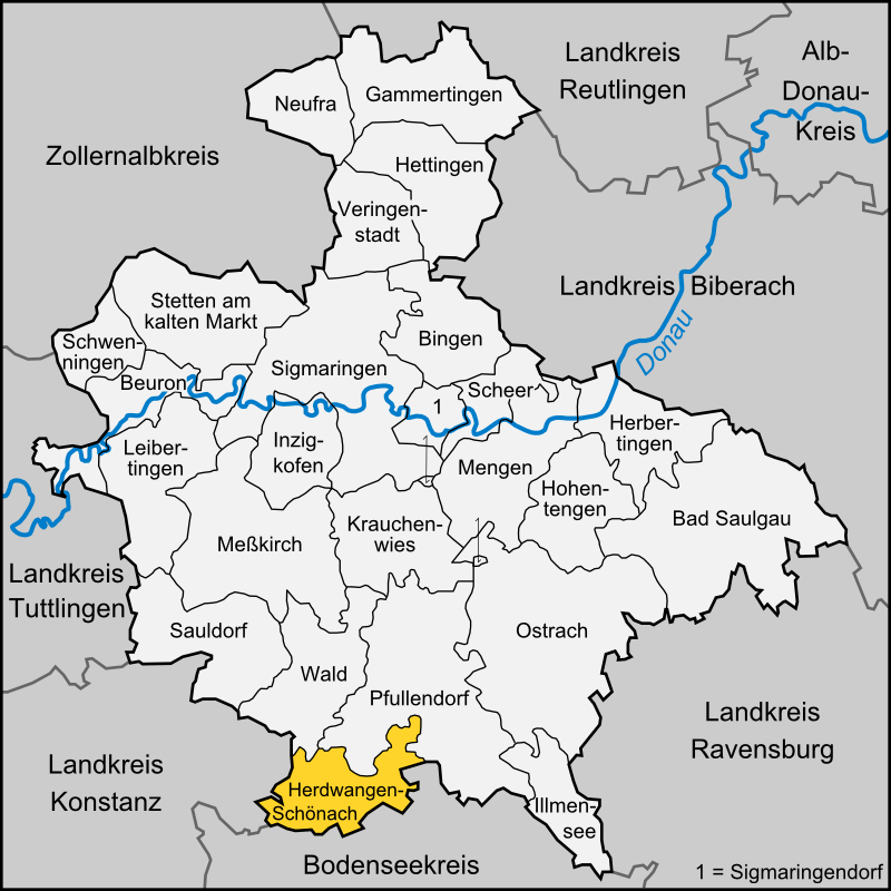 Karte der Gemeinde Herdwangen-Schönach im Landkreis Sigmaringen